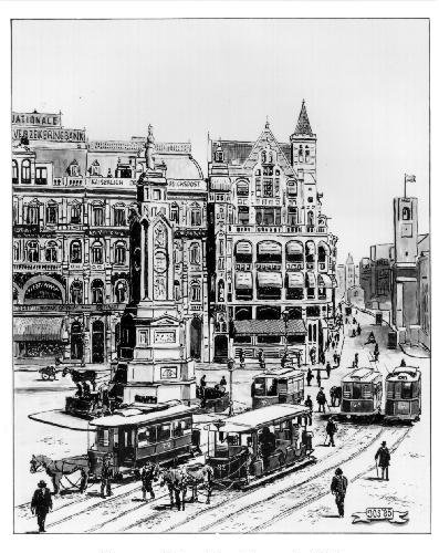 Met toestemming van eigenaar en maker: Jos Wiersema 28 aug 2007 00:20 (CEST)«Dam en paardentram te Amsterdam omstreeks 1903»